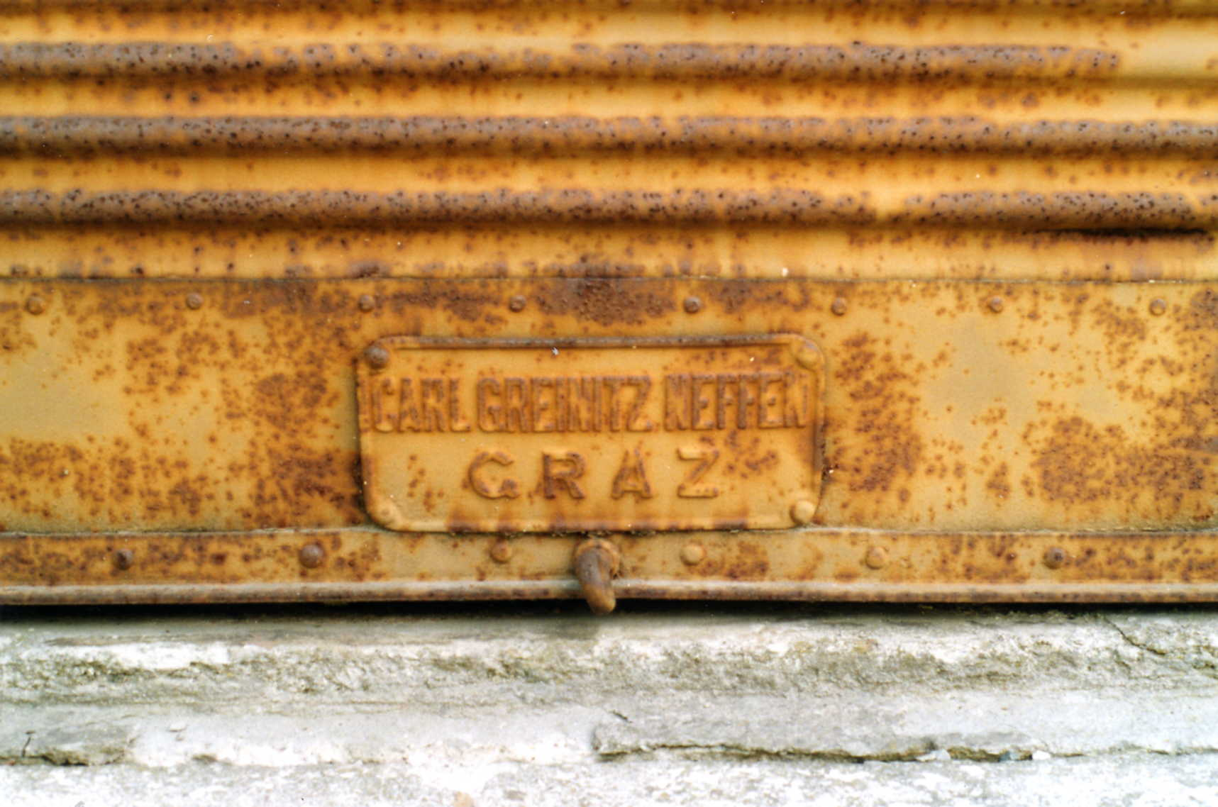 Alte Jalousie eines Hauses in Stari trg (Region Bela krajina), Slowenien – Aufschrift: „Carl Greinitz Neffen Graz“